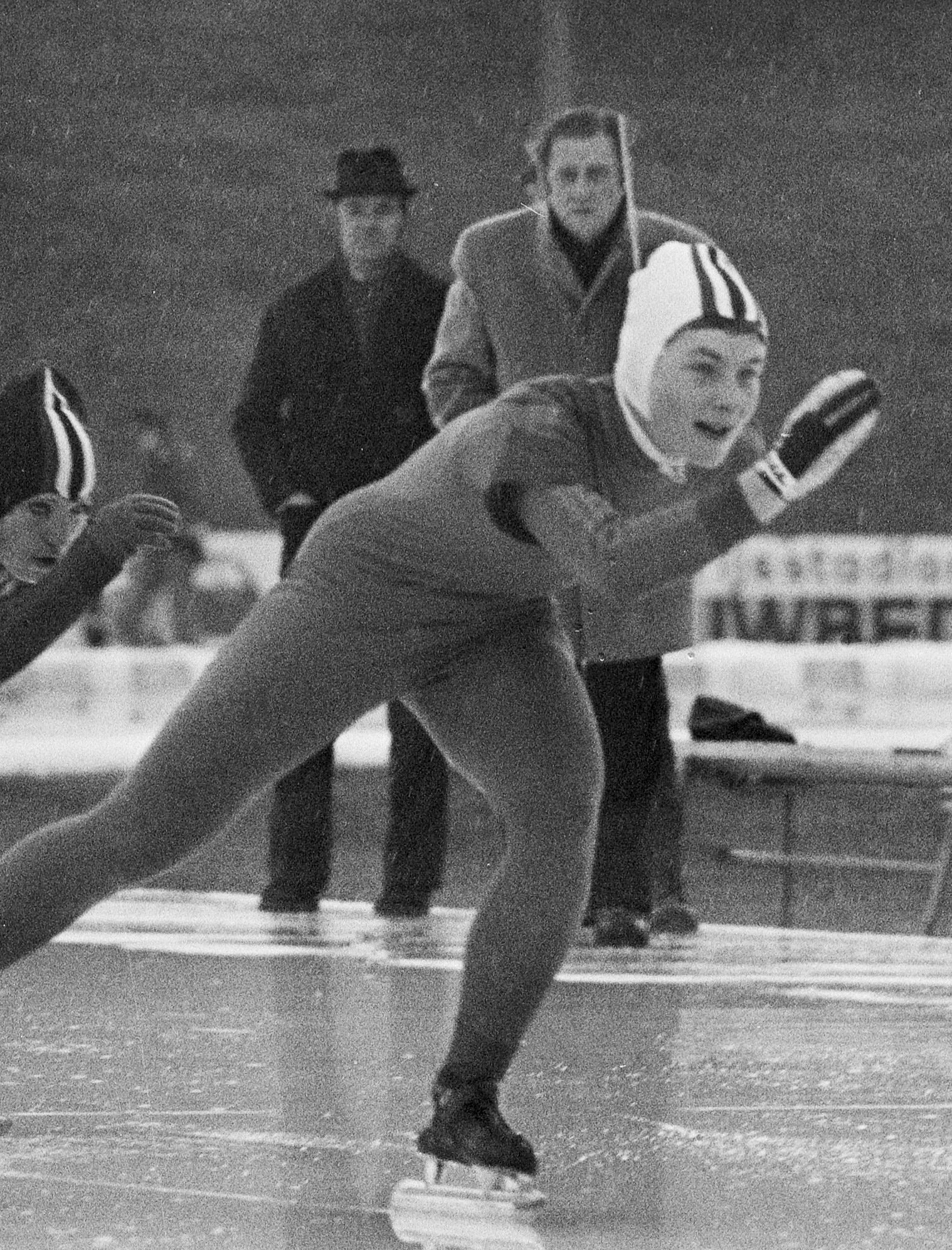 Schaatsinterland Nederland tegen USSR in Assen; Christine Jaarsma tegen Lalina Stepanskaja in aktie